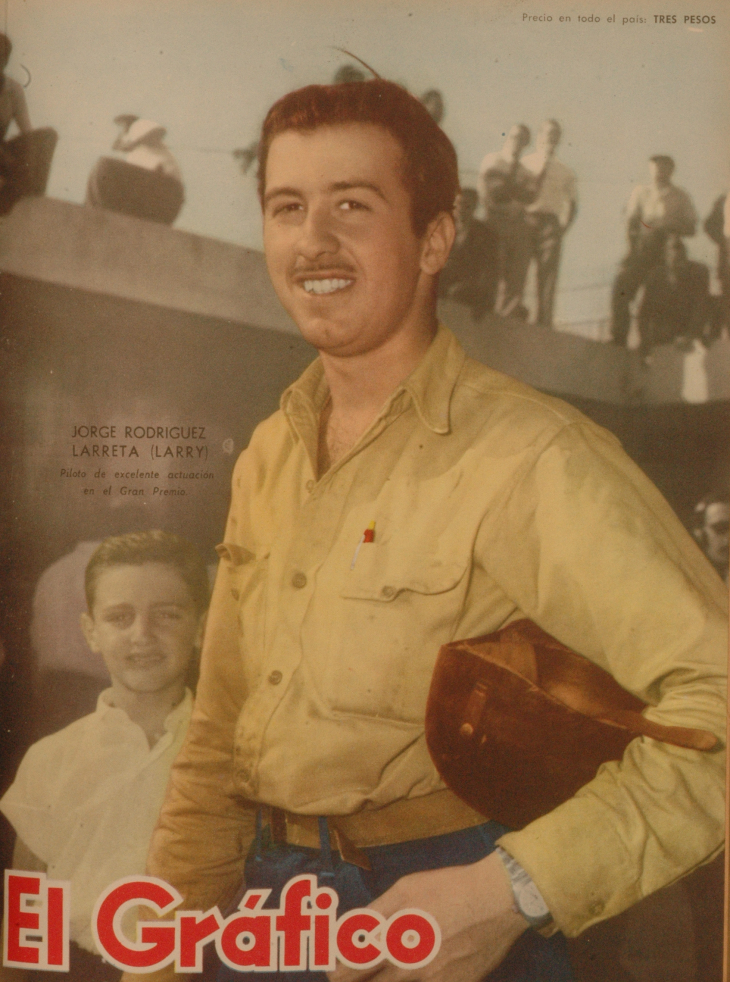 El Grafico del 17 de Enero de 1958. Edicion 2001